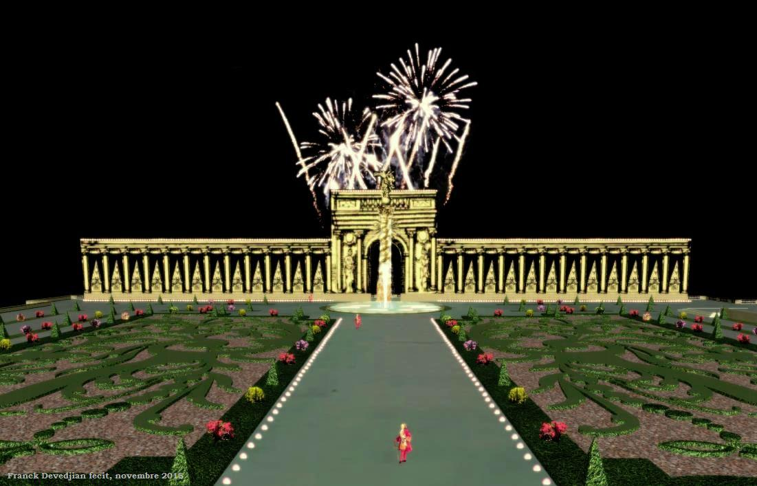 Essai de restitution de l'illumination du 27 août 1704.